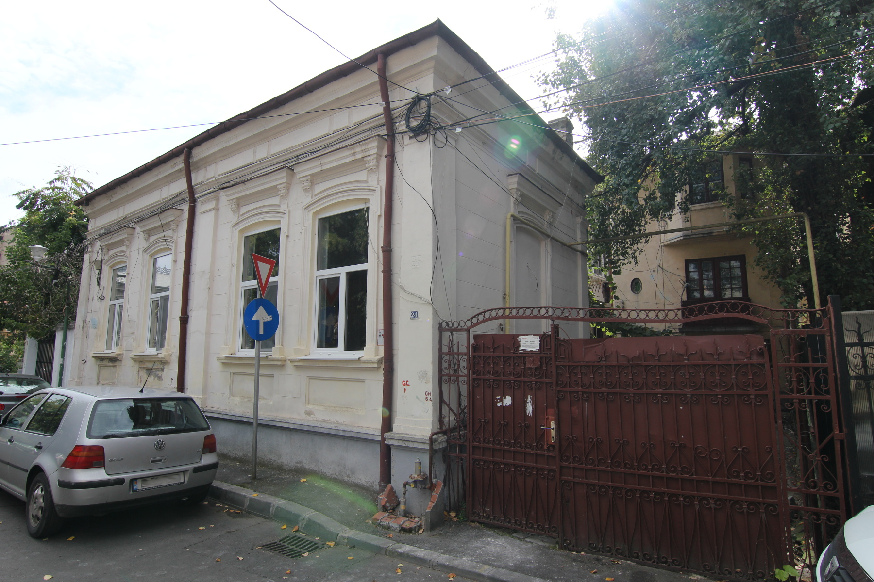 Casă pe Stelea Spătarul